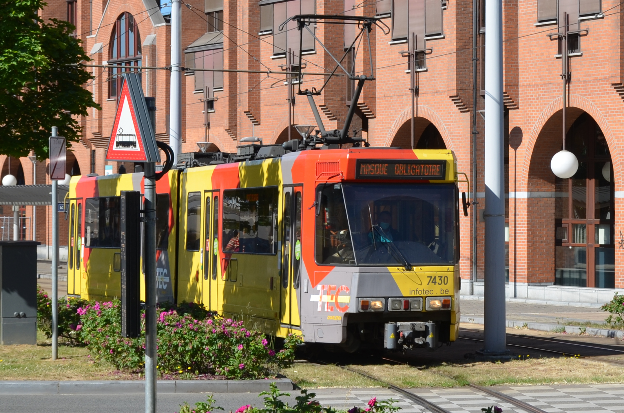 Métro léger de Charleroi - Véhicule 7430 quittant l'arrêt Tirou et se dirigeant vers la station Parc. La girouette indique en alternance la destination et la mention « Masque obligatoire » pendant la pandémie COVID-19.